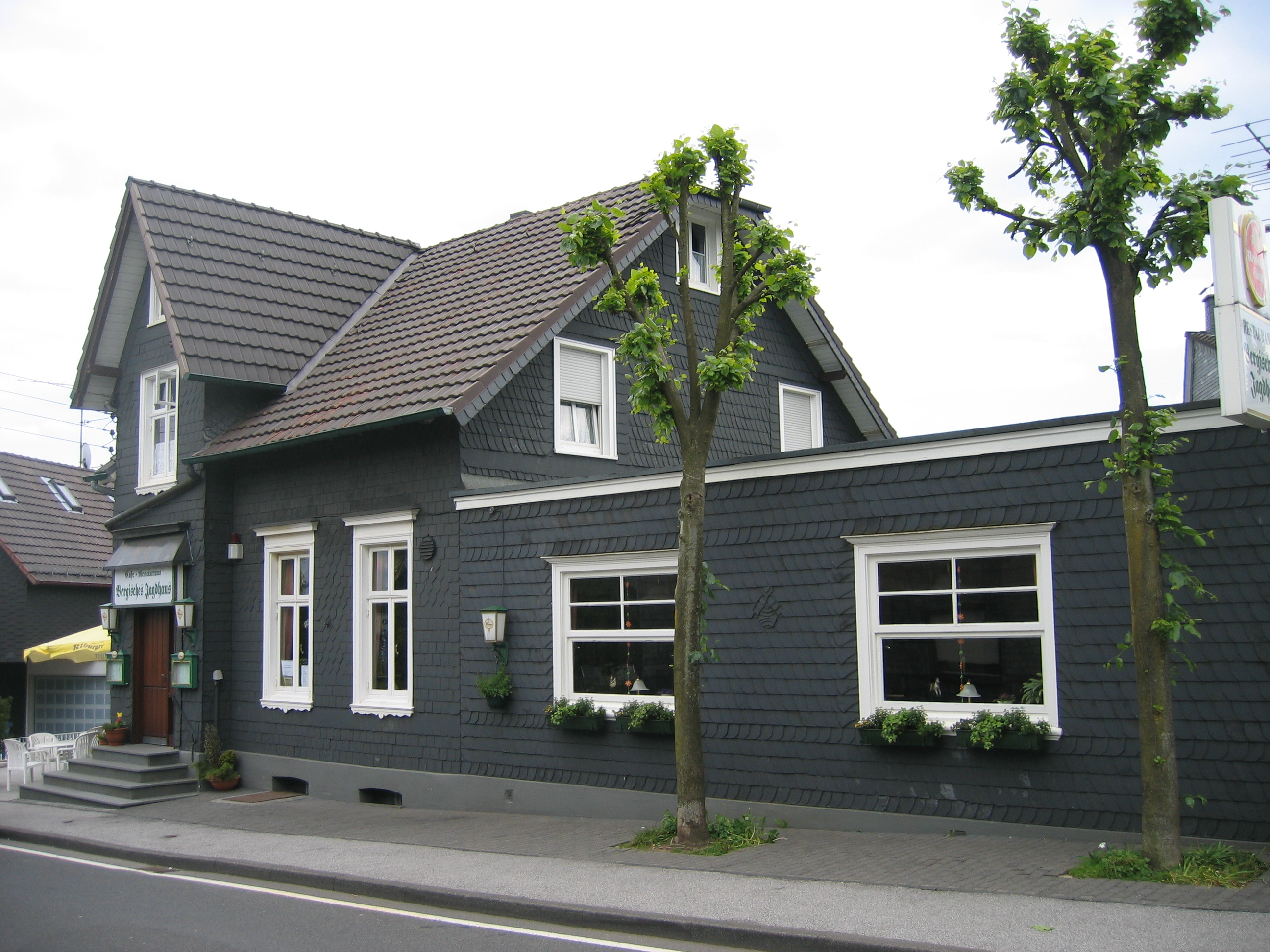 Restaurant in Pohlhausen (Wermelskirchen)